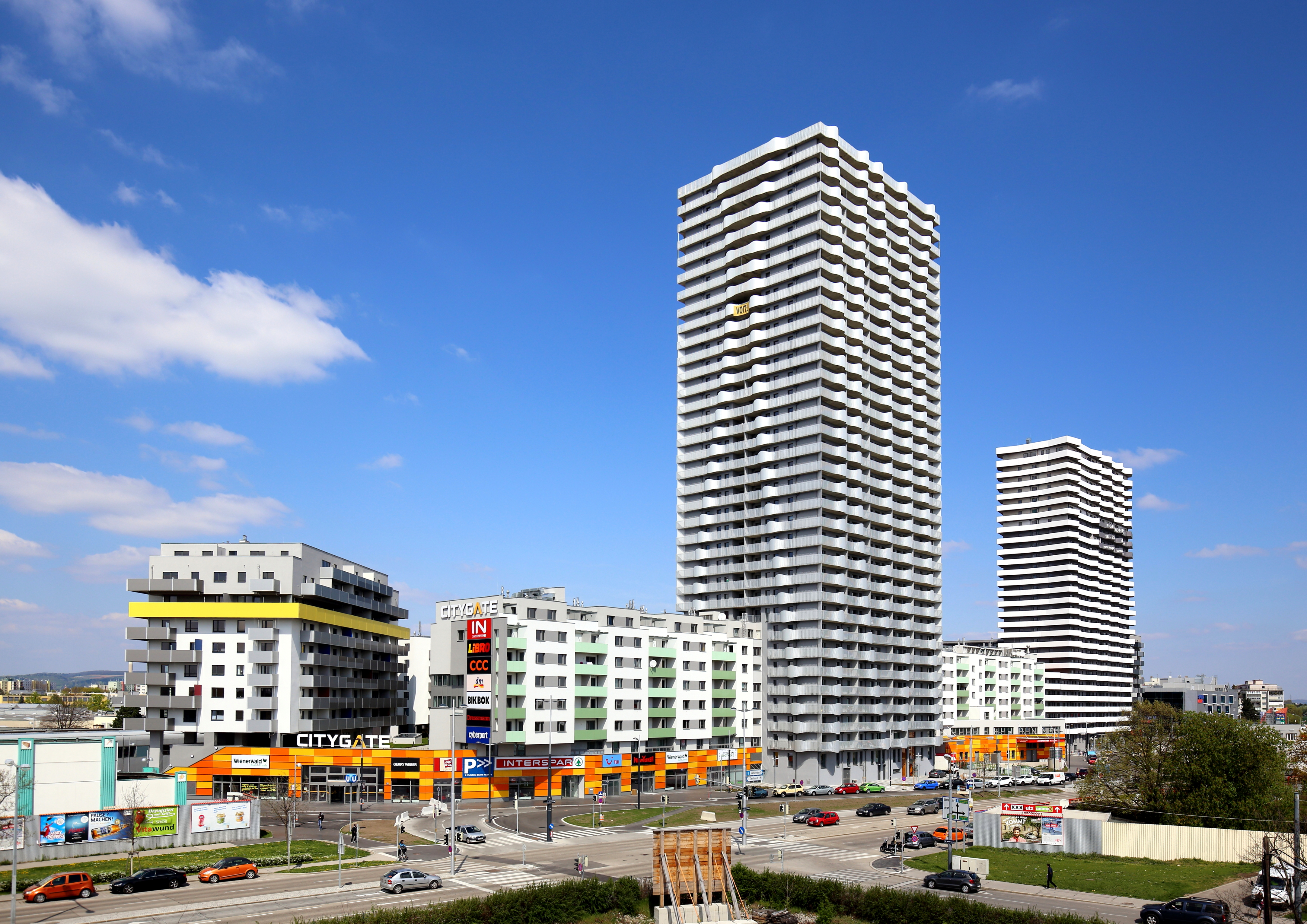 Wohnhausanlage und Einkaufszentrum Citygate in der österreichischen Bundeshaupstadt Wien. Von 2013 bis 2015 an der Wagramer Straße 195, Ecke Aderklaaer Straße und Holzmanngasse, errichtet. Sie umfasst 1012 Wohneinheiten, einen Kindergarten und einen Einzelfachmarkt mit 14.500 m² Nettoverkaufsfläche für rund 50 Geschäfte. Im Zentrum der Anlage befindet sich der 35-geschossige CGL Tower mit einer Höhe von rund 100 Meter.